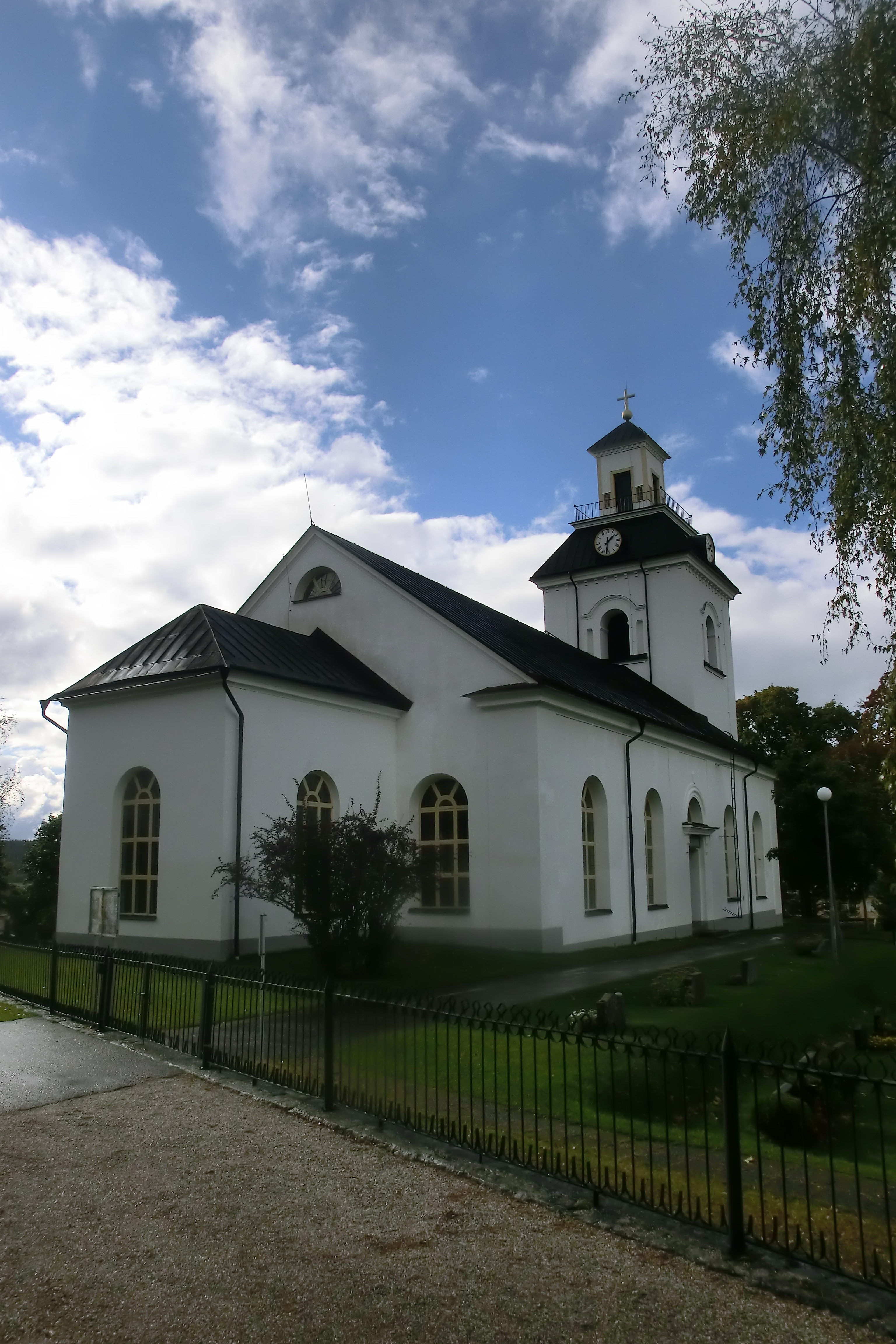 Ilsbo kyrka